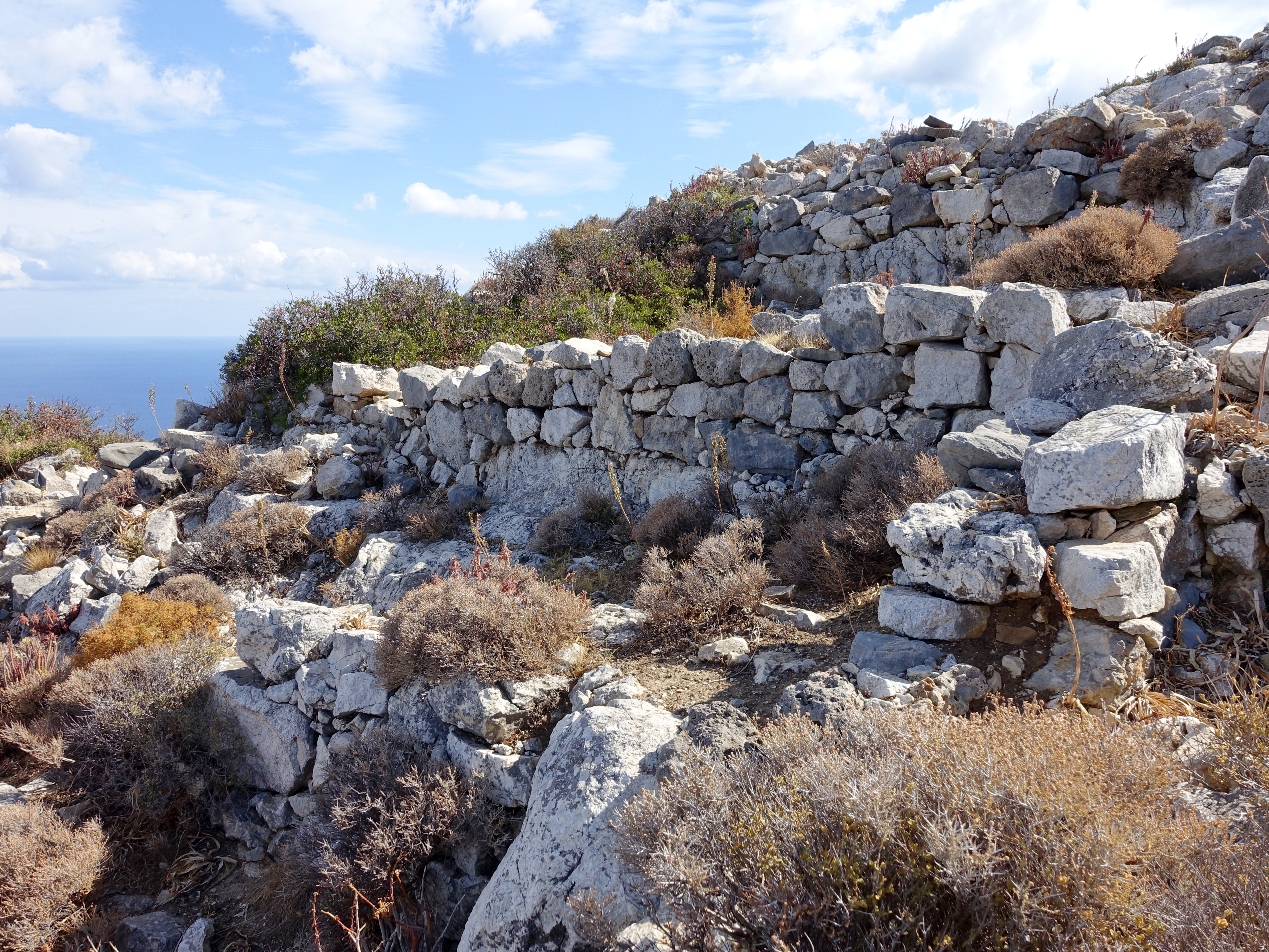 Ausgrabungsstätte von Vrokastro (Βρόκαστρο) bei Istro, Gemeinde Agios Nikolaos, Kreta, Griechenland